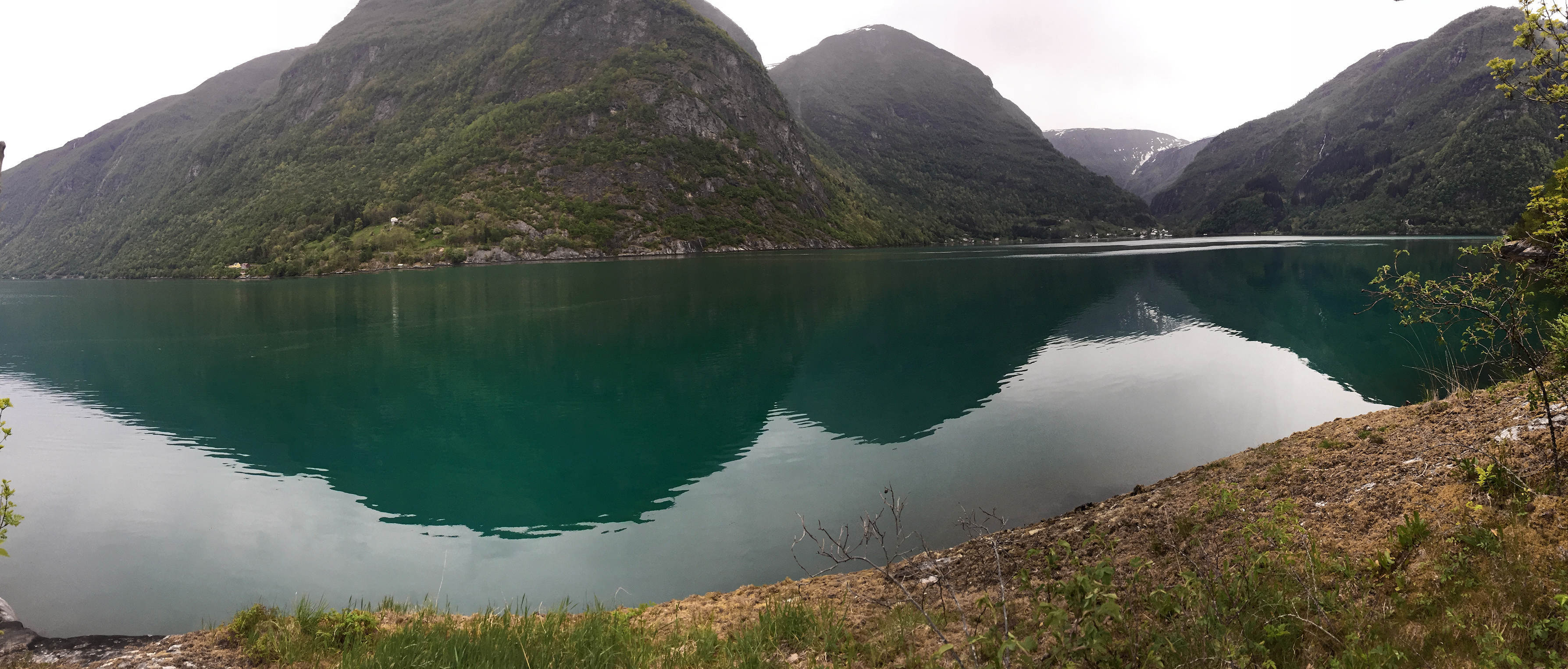 Bilete teke på Nese mot Vabergane, med utsyn over Indrefjorden (til høgre). Lengst til venstre er Framfjorden. Ver merksam på at biletet er teke under vanskelege lystilhøve og at fjorden difor ser raudare ut på biletet enn i røyndi. Det grønlege smeltevatnet kjem heller ikkje so godt fram.